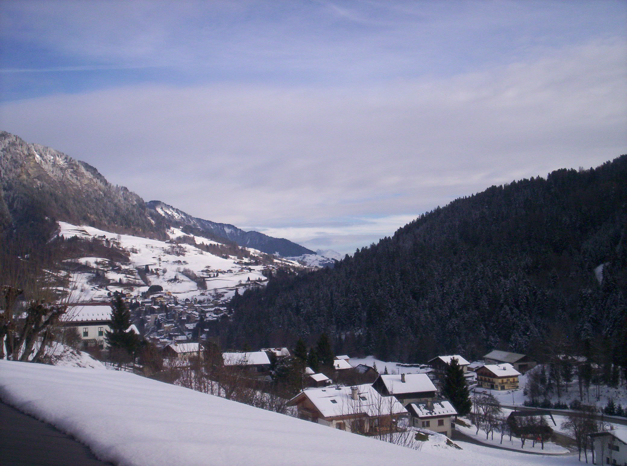 val